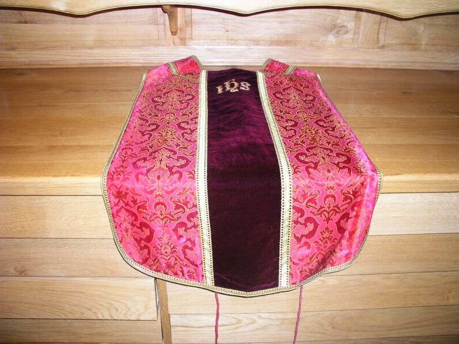 Rosafarbenes Kasel für Laetare und Gaudete.